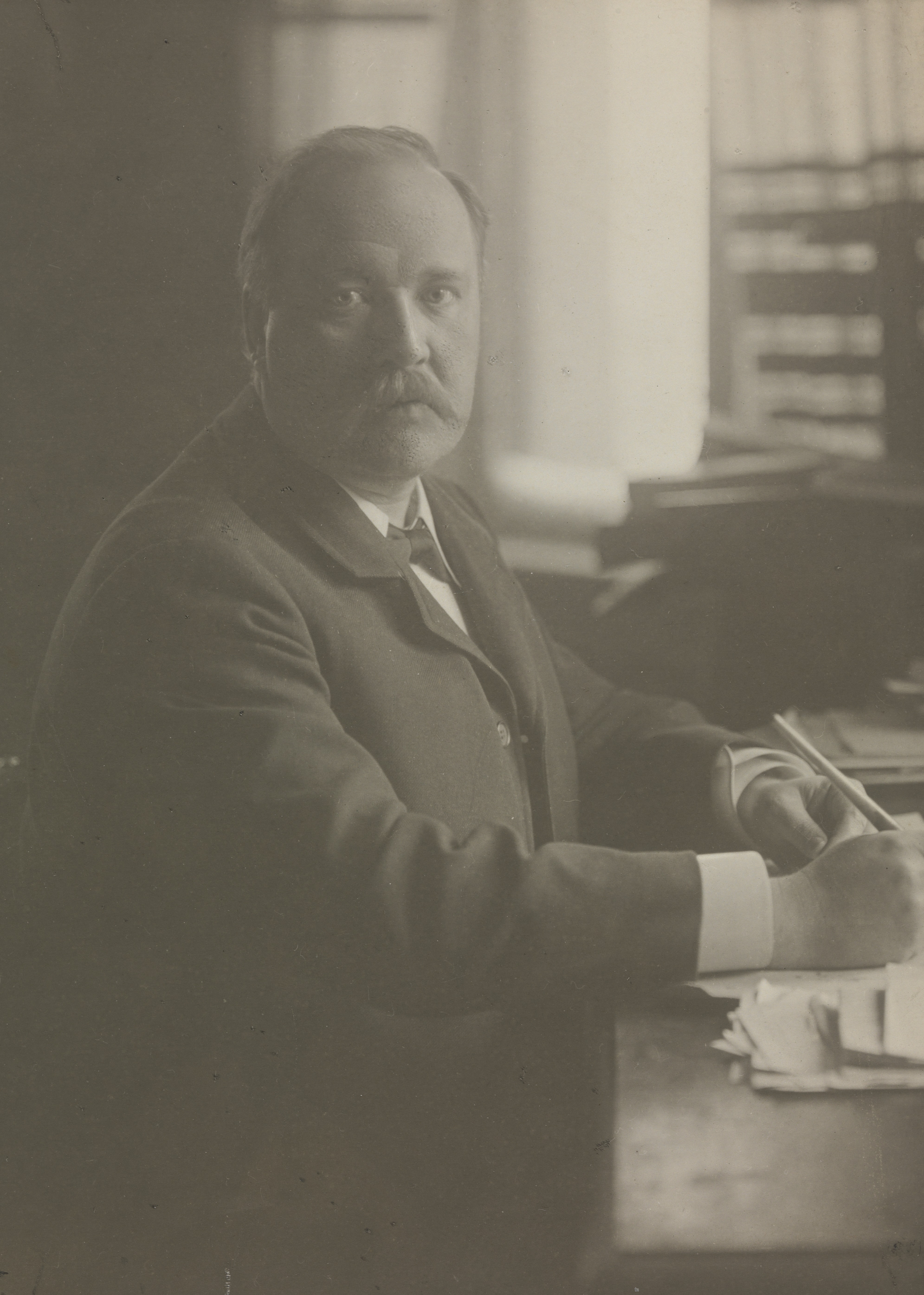 Svante Arctenius, svensk vitenskapsmann. Med dedikasjon. Depicted person: Arctenius, Svante (1859-) Depicted place: Sverige, Stockholm